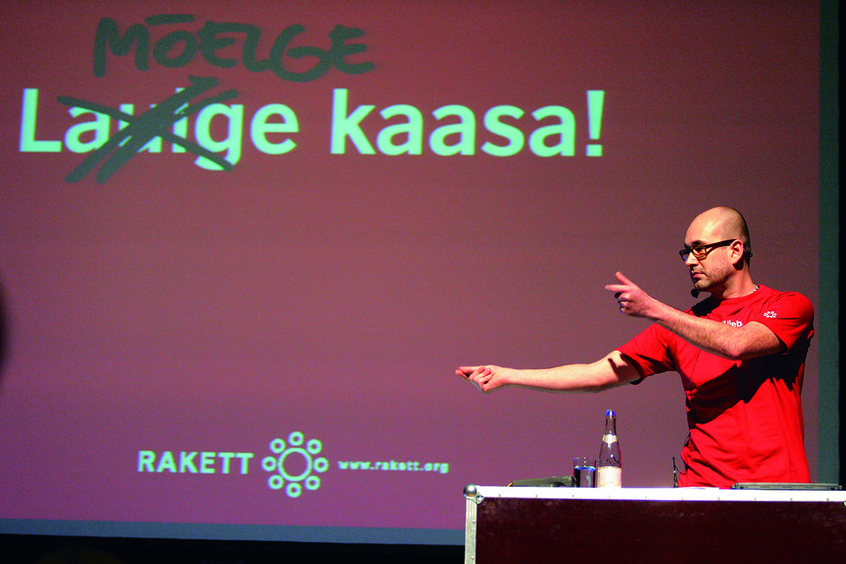 Asko Künnap Tartus Turunduskonverentsil